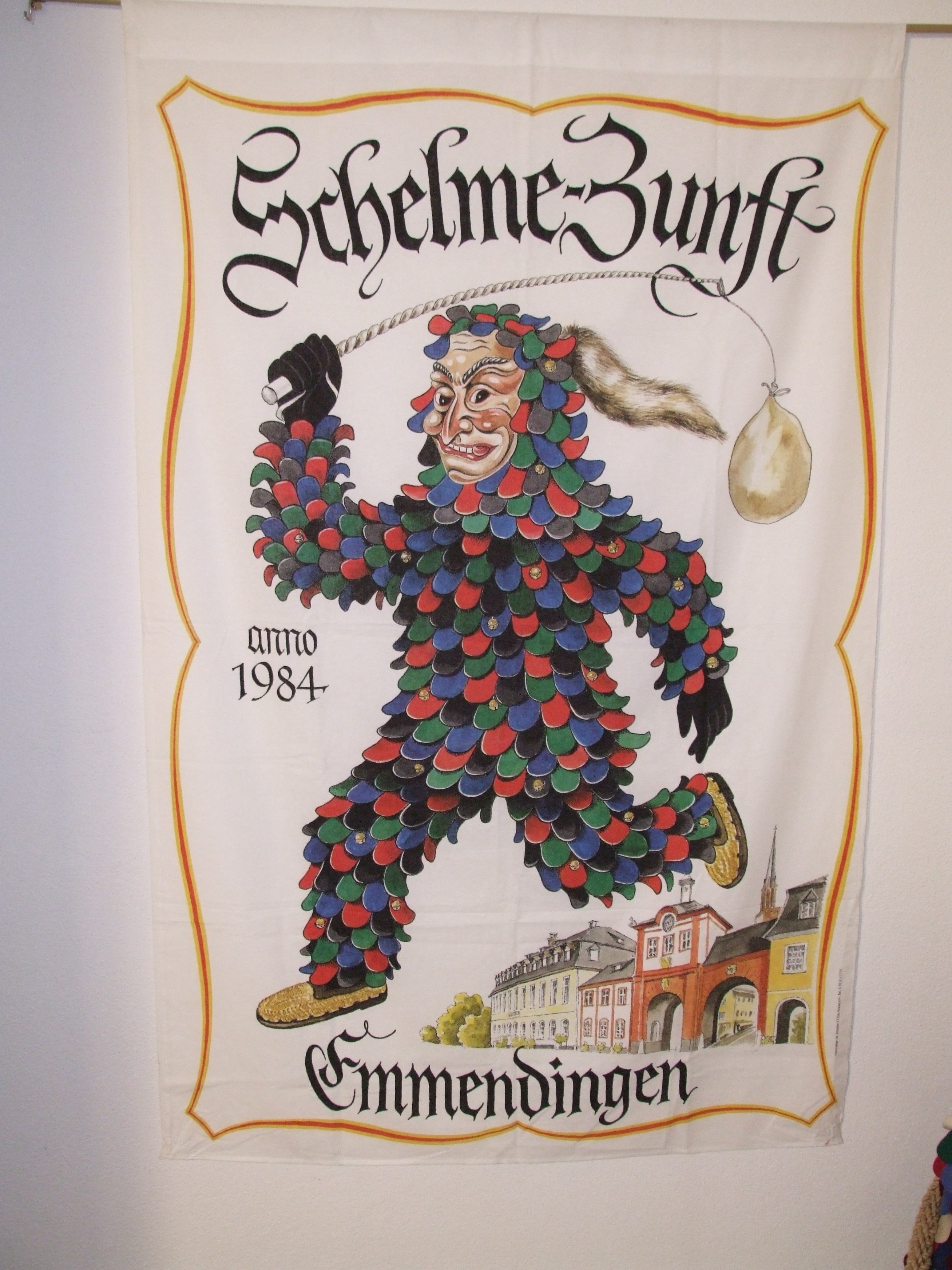 Fahne der Schelmezunft Emmendingen